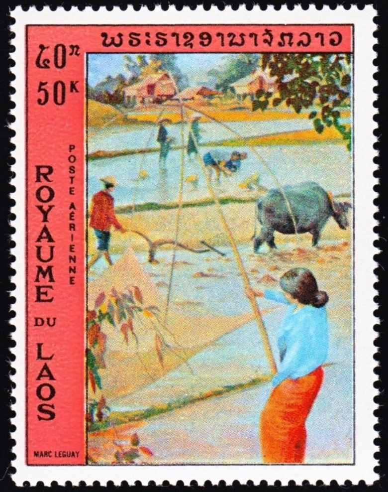 peinture de marc Leguay (Laos 1972)